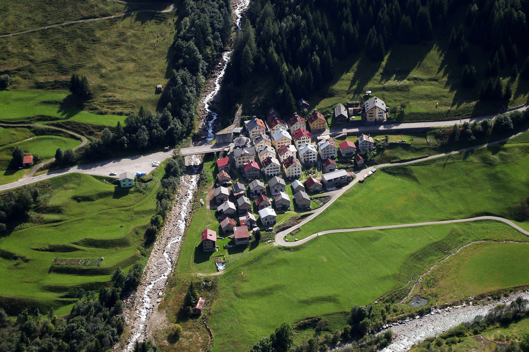 Fontana im Bedrettotal